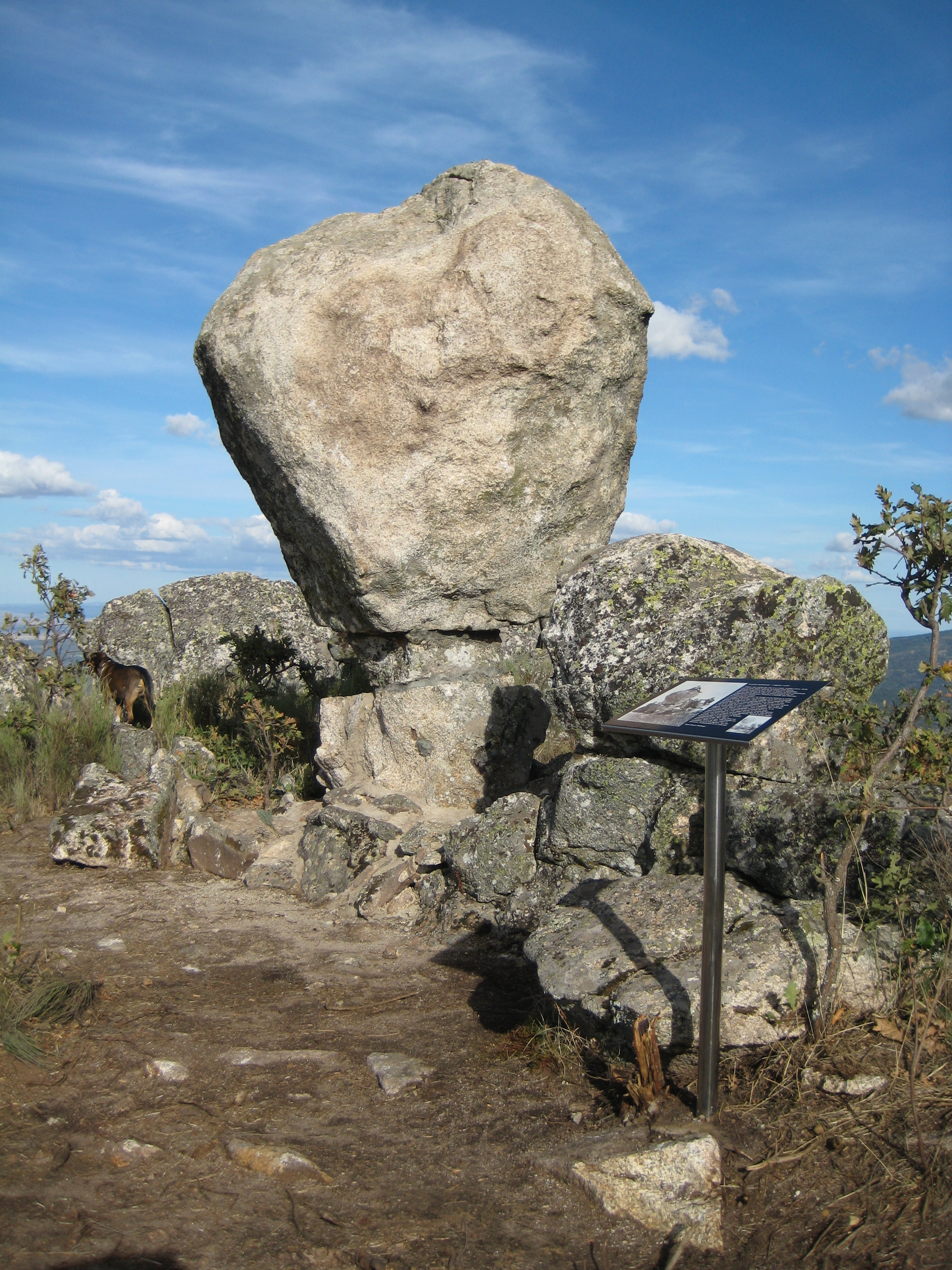 Elemento geográfico singular de la sierra de Montánchez